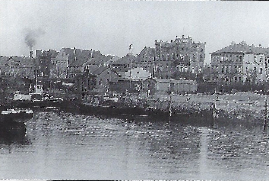 Südliche Geestekaje in Geestemünde, mit Schuppen und der Straße Am Deich, rechts das Hotel Hannover.